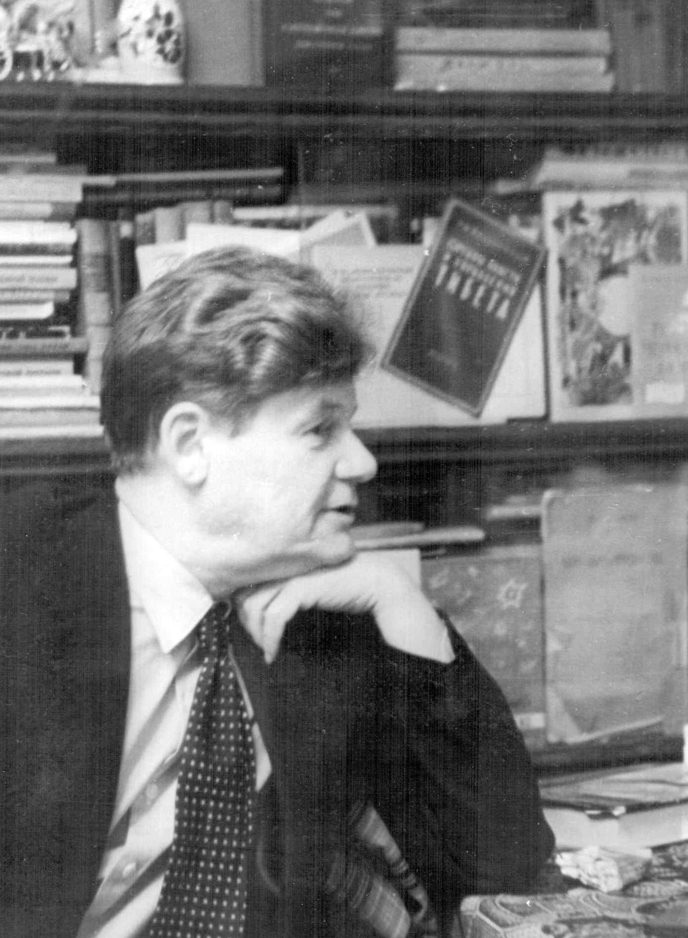 Леонид Николаевич Мартынов. 1957 г. Фото В. Уткова